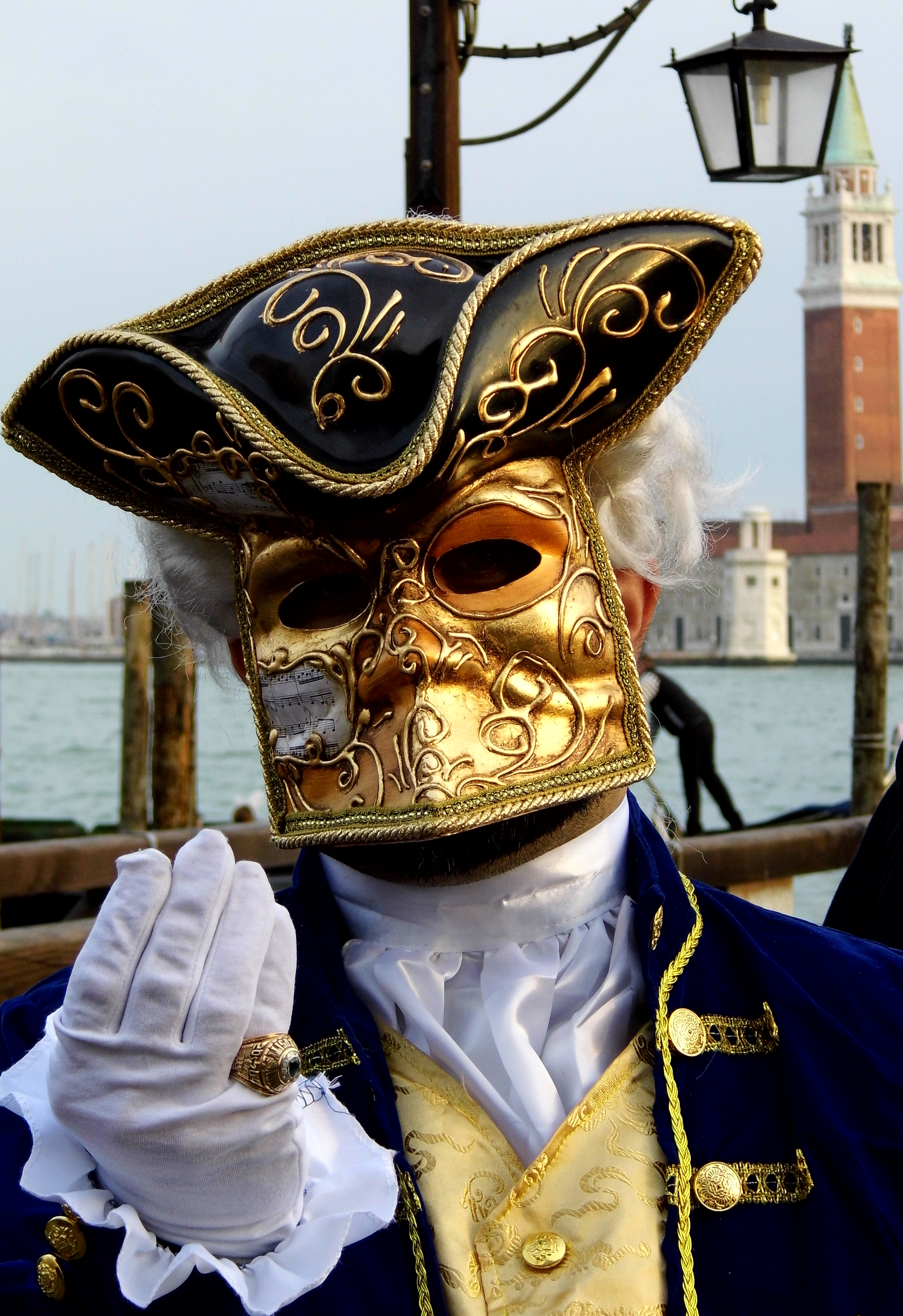 Karneval in Venedig